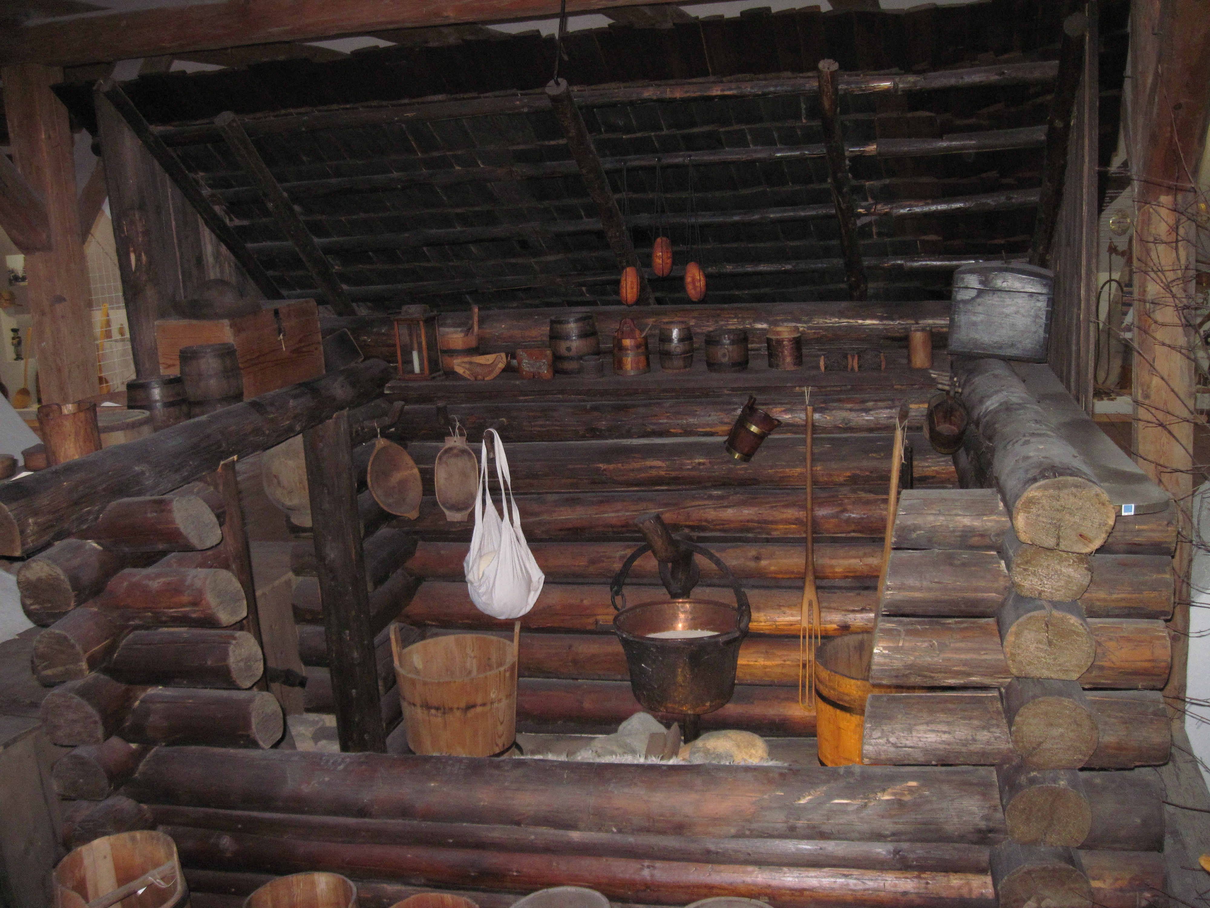 Typická ovčiarska koliba na Liptove (Ovčiarske múzeum v Liptovskom Hrádku)